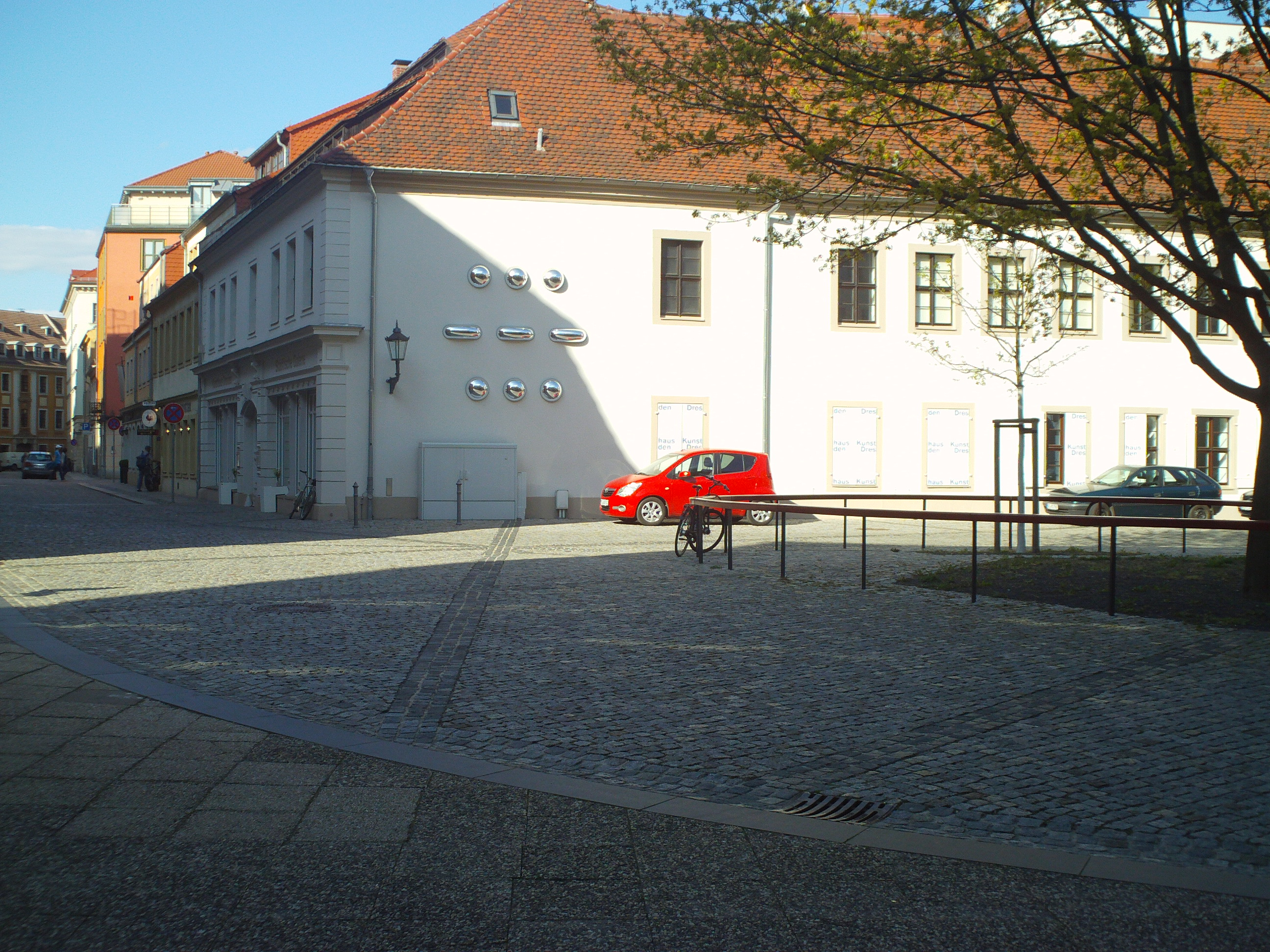 Deitsch: Kunsthaus Dresden mit Haupteingang